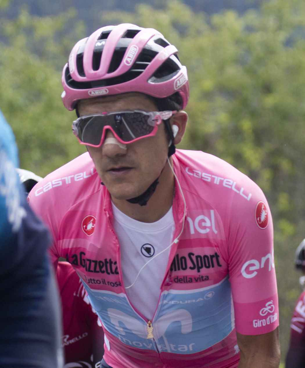 GIRO0536 carapaz